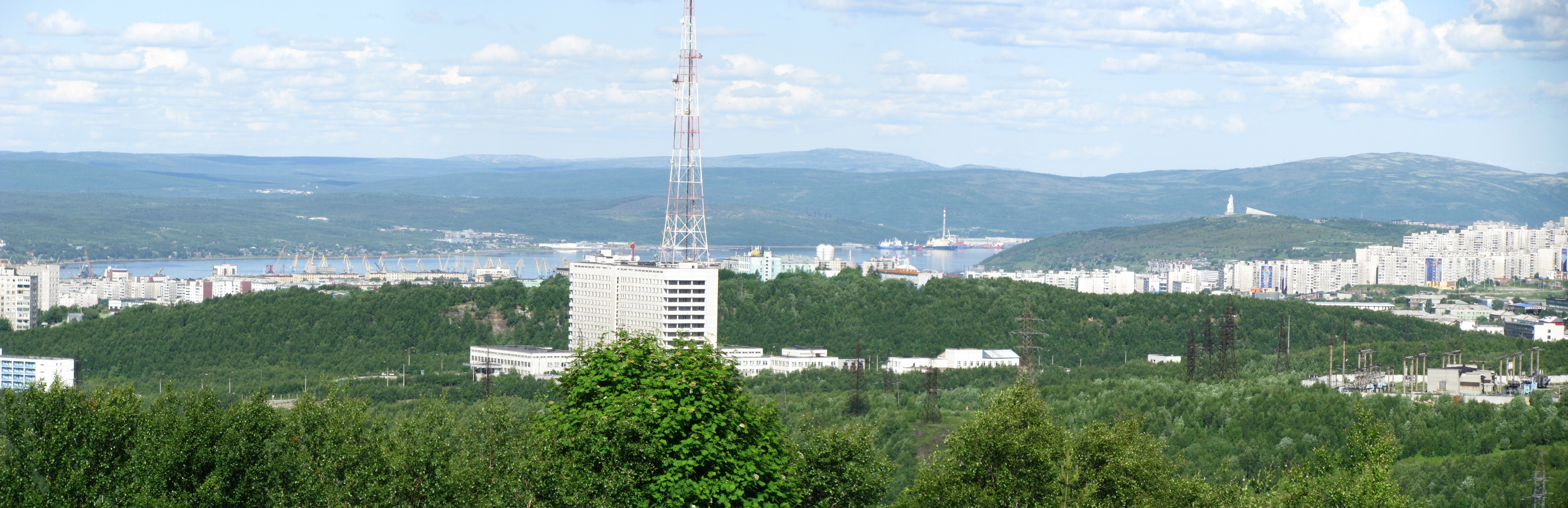 Вид с Ленинградки на Мурманск